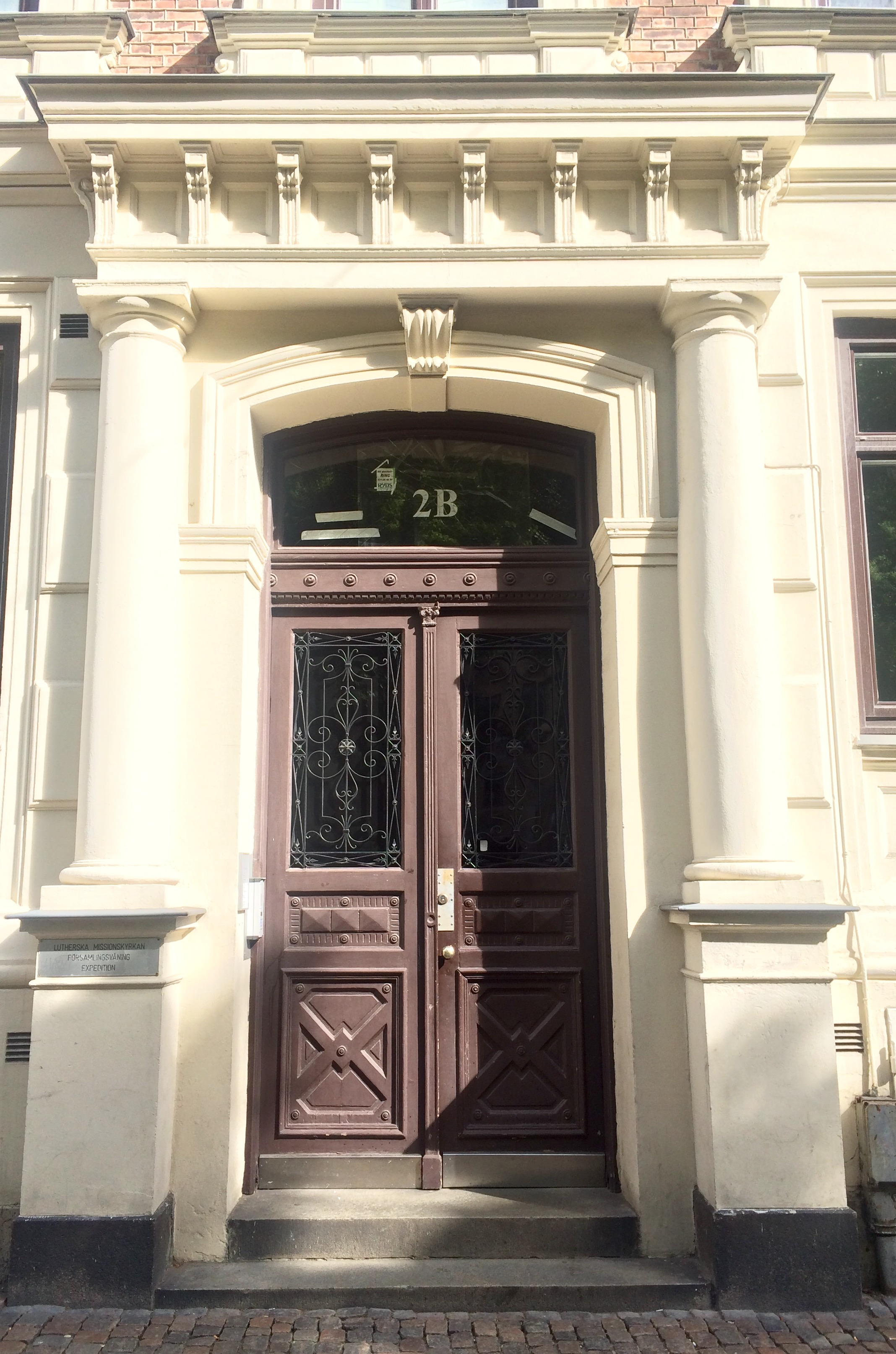 Vasagatan 2B, pardörr med smidesjärnsgrill. Lunettfönstret är krossat.